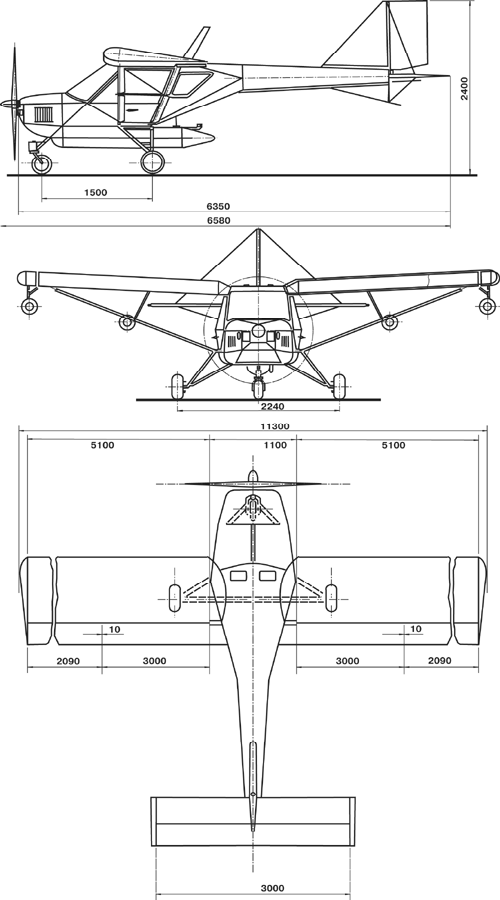 НАРП-1 - легкий многоцелевой самолет